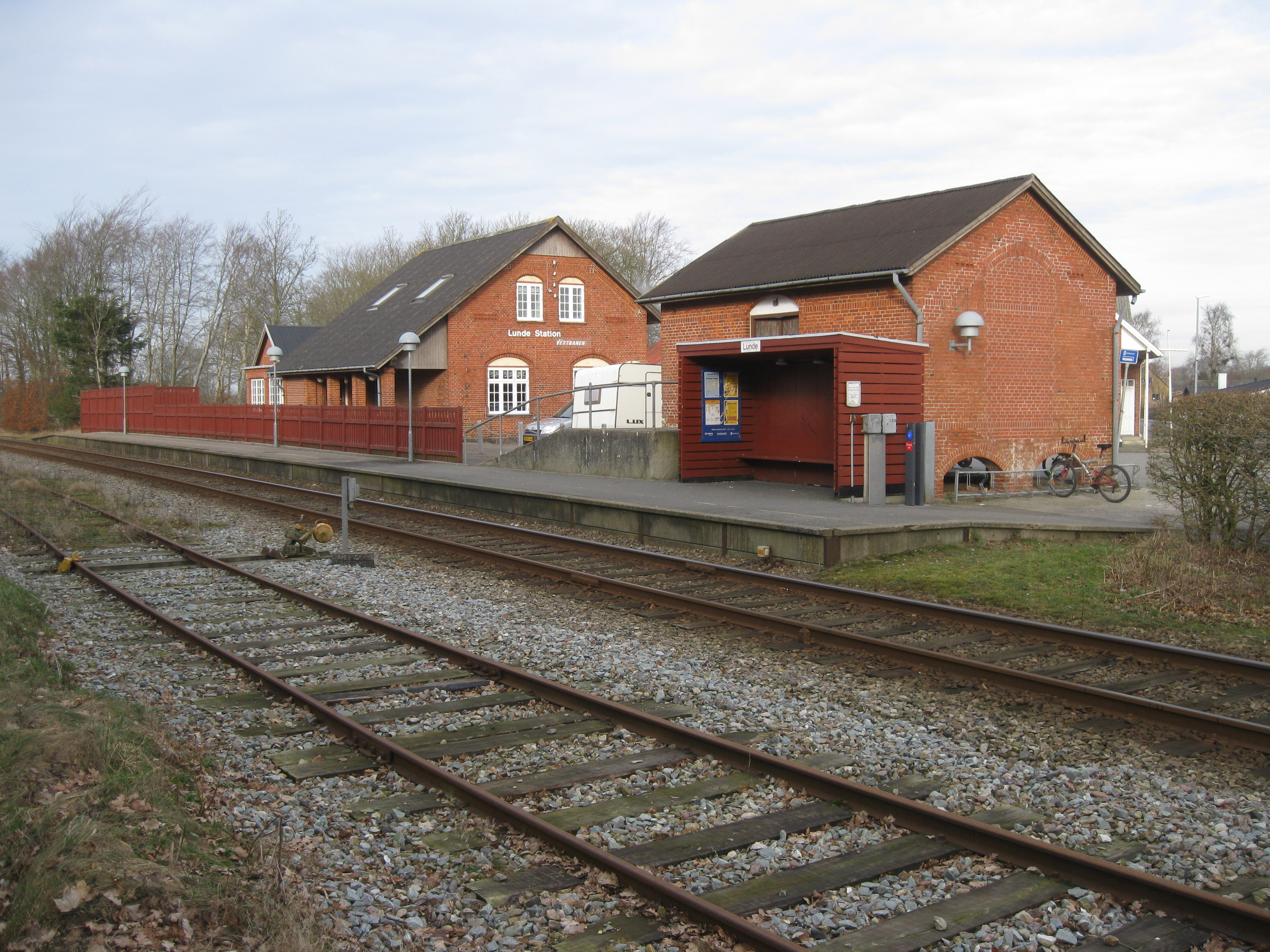 Lunde Station på Vestbanen